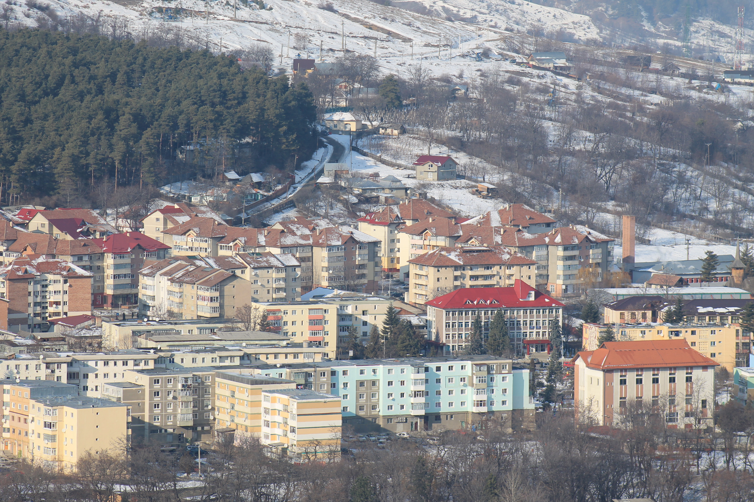 Blocuri Moinesti